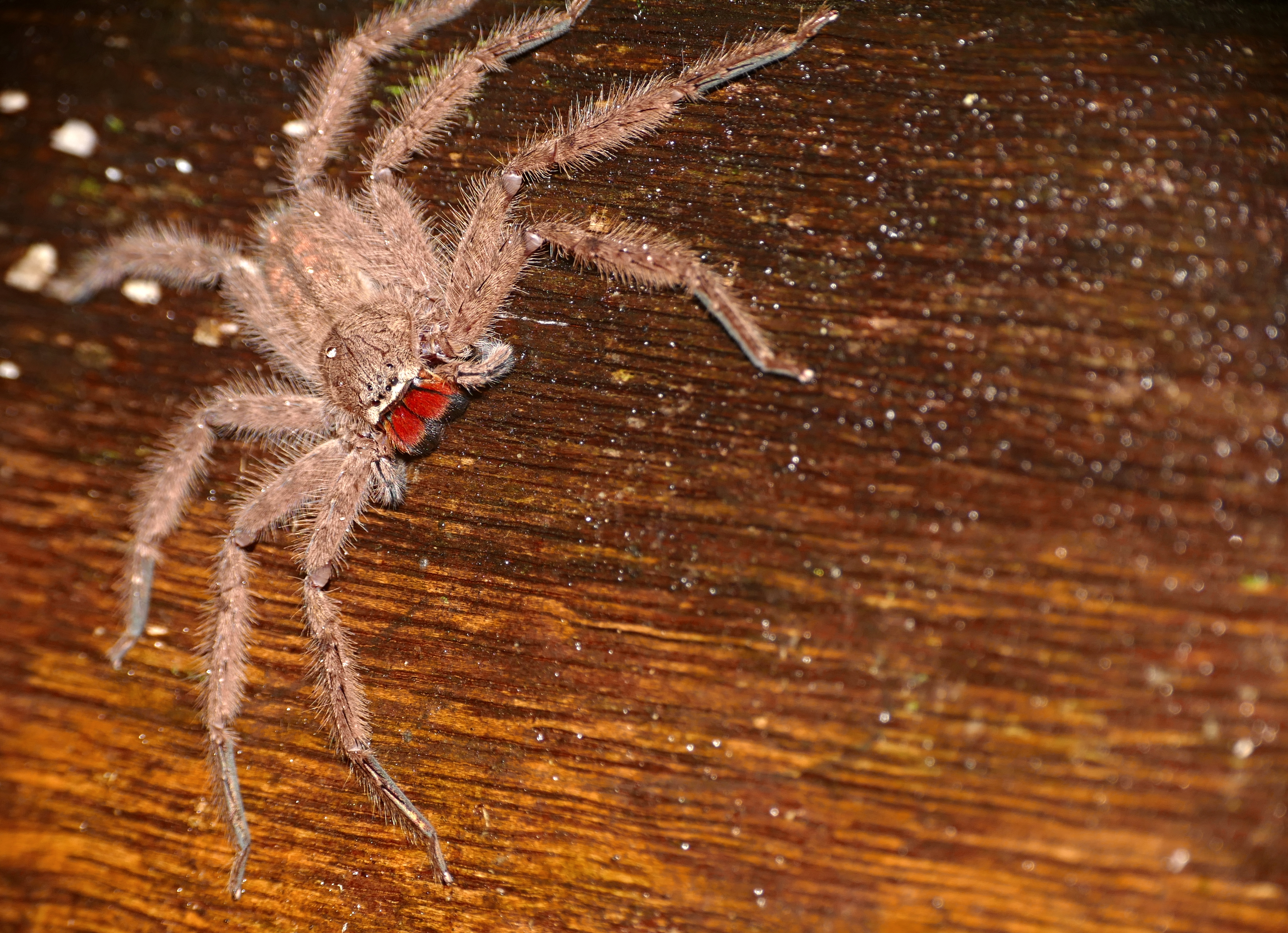 Mulu NP, Sarawak, MALAYSIA